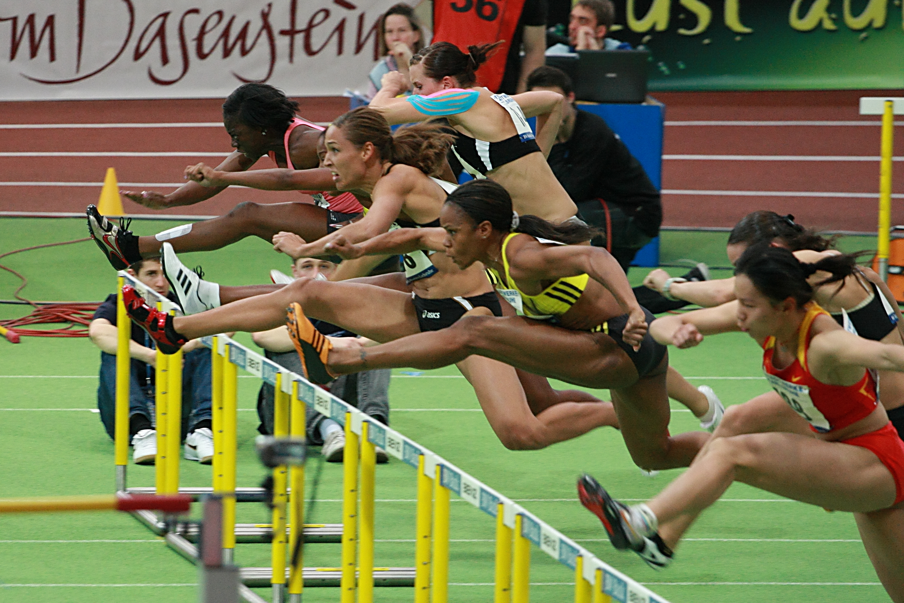 BW Bank Meeting Karlsruhe 2010